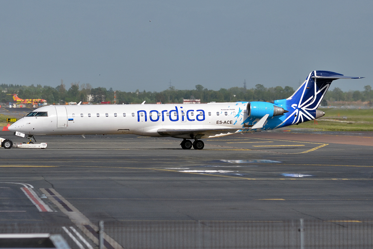 Nordica, ES-ACE, Bombardier CRJ-701ER